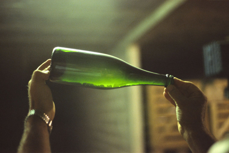 Champagnerflasche mit Bodensatz aus abgestorbener Hefe vor dem Degorgieren